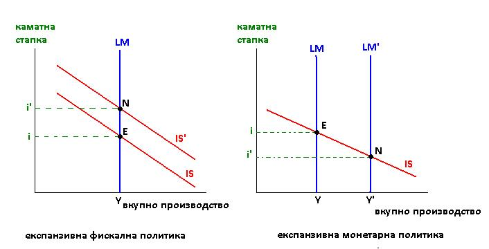 Кога побарувачката на пари не е под влијание на каматната стапка, LM кривата е вертикална. На левиот графикон, експанзивната фискална политика ја поместува IS кривата до IS' и го остава вкупното производство непроменето на Y. На десниот графикон, зголемувањето на понудата на пари ја поместува LM кривата до LM' и го крева вкупното производство на Y' . Затоа монетарната политика е ефективна, а фискалната не.